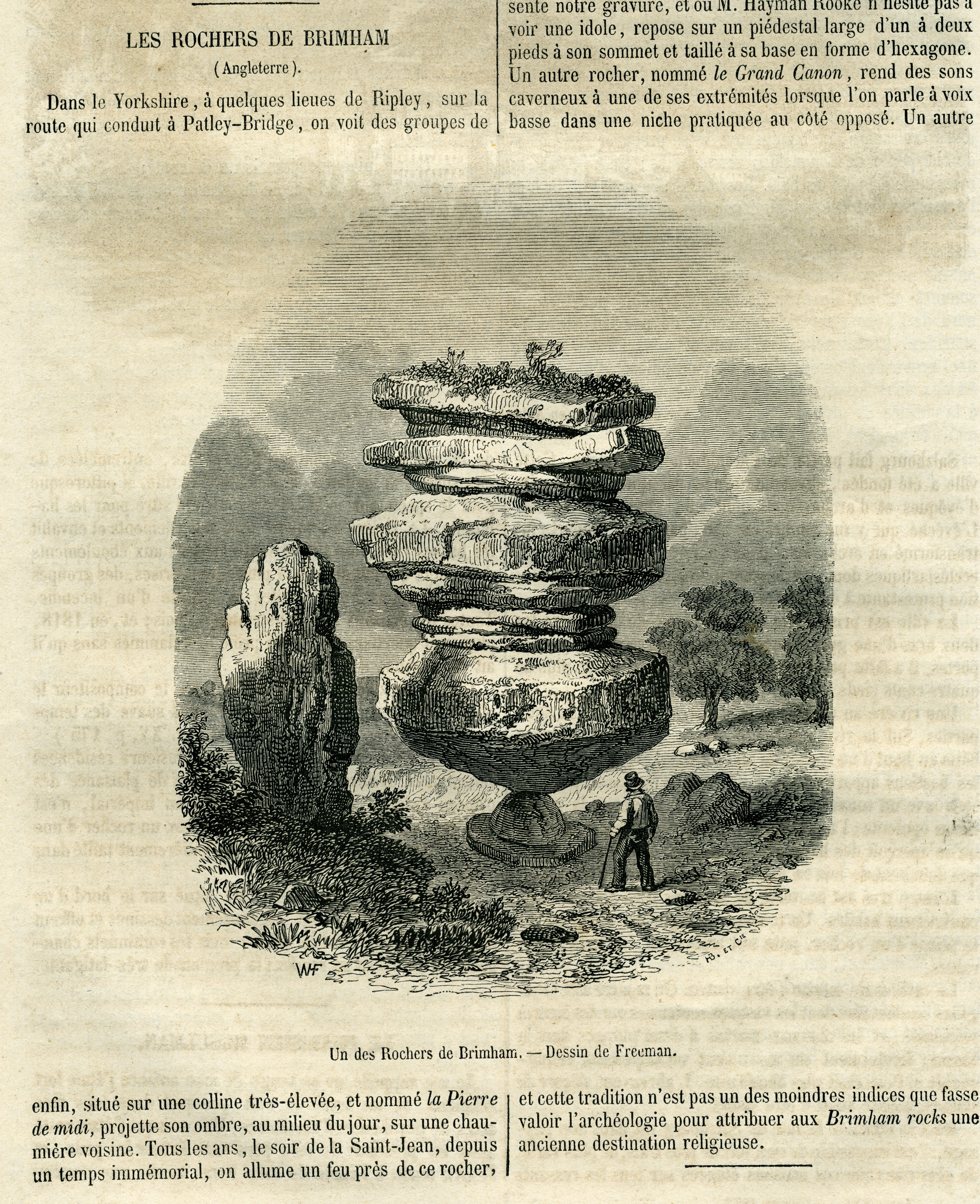 from Le Magasin Pittoresque, 1853